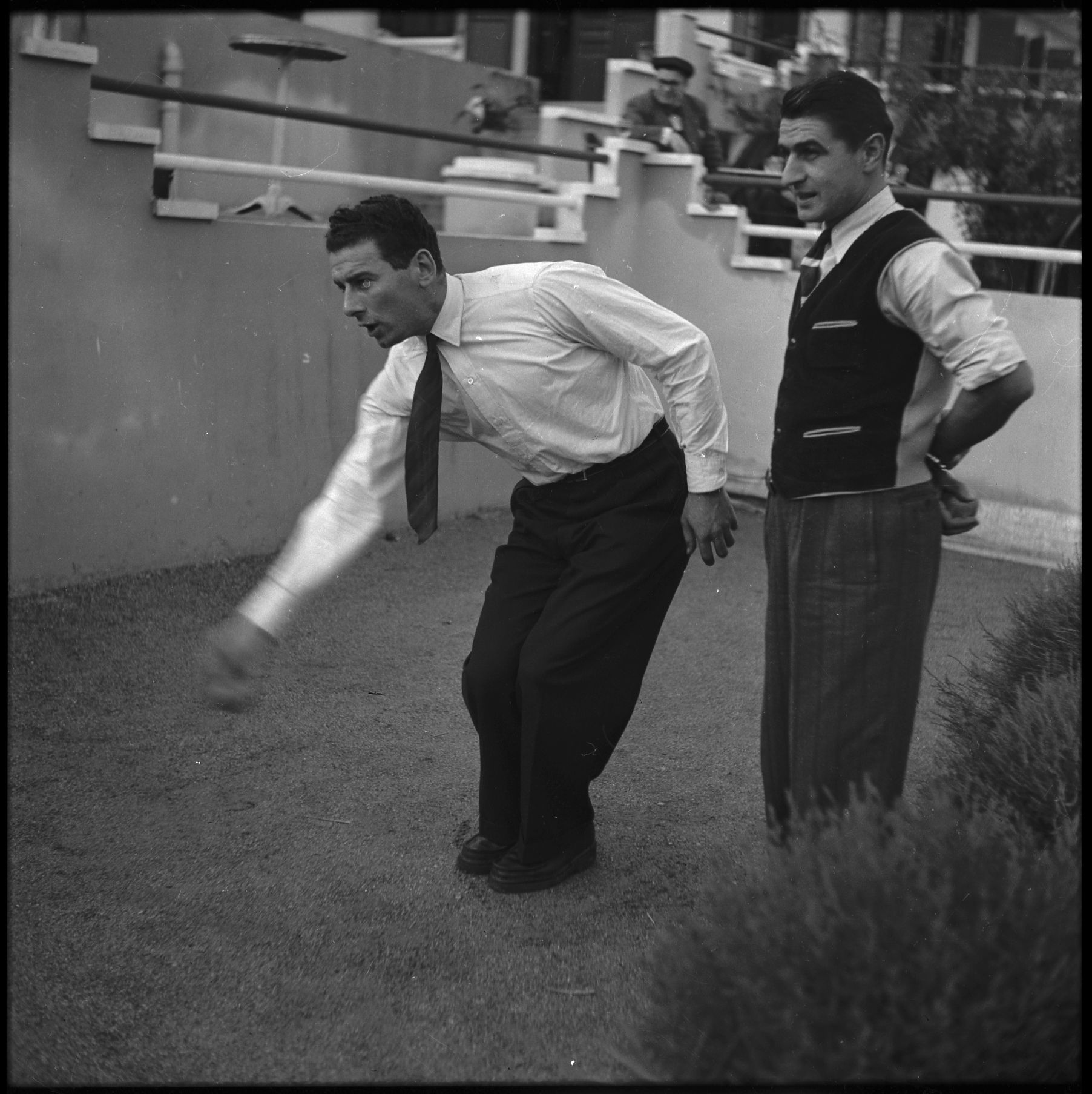 Boulodrome de Toulouse. 13-14 Juillet 1949. Vue des deux cyclistes René Vietto et Lucien Tesseire lors d'une partie de pétanque à Toulouse ; Lucien Teisseire vient de lancer sa boule sous le regard de René Vietto ; un homme avec une casquette observe au second plan sur une terrasse.